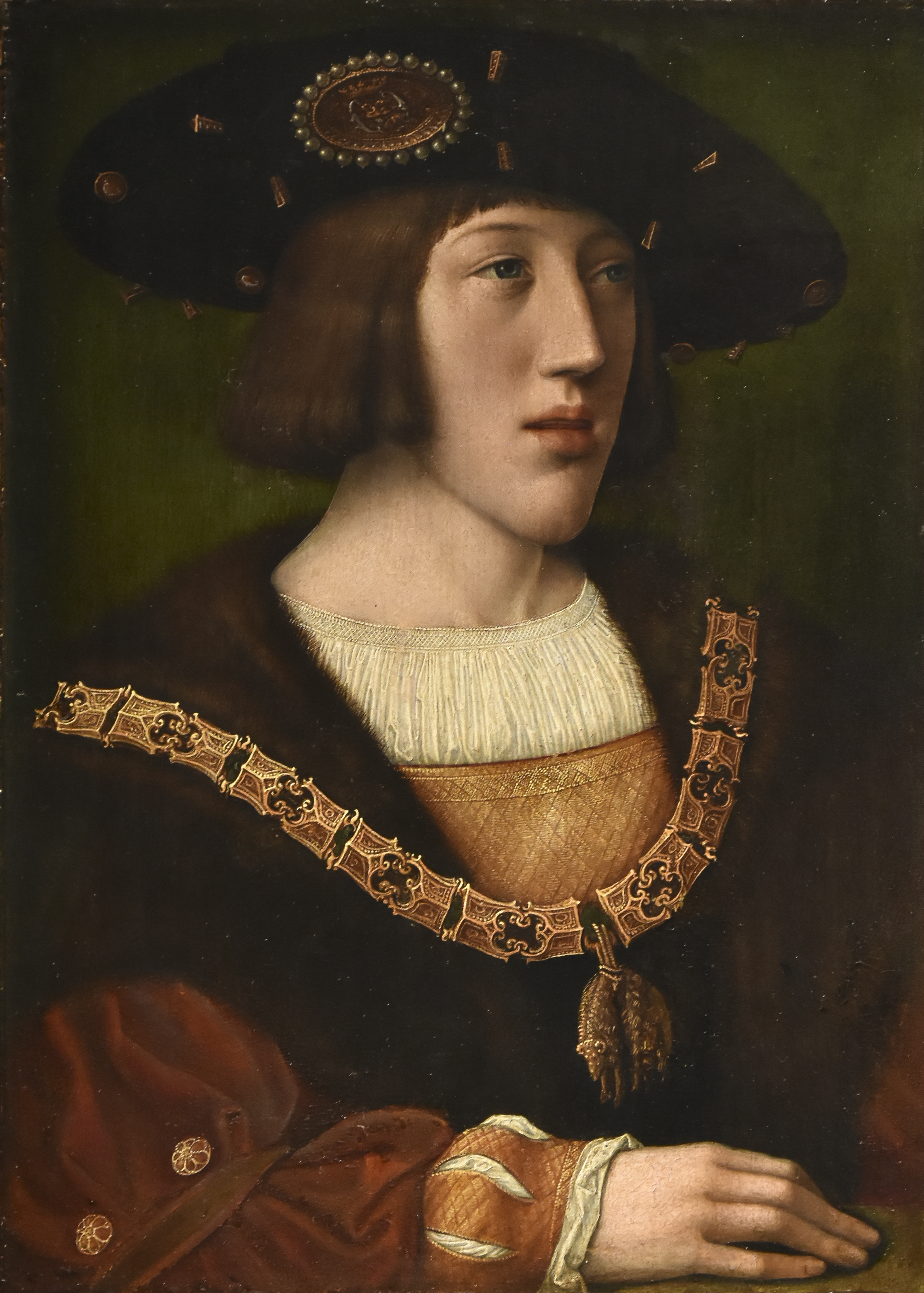 Karel V - Koninklijk klooster van Brou - besteld door Margaretha aan van Orley in 1516 om de kinderen van haar intussen overleden broer Filips de Schone te portretteren